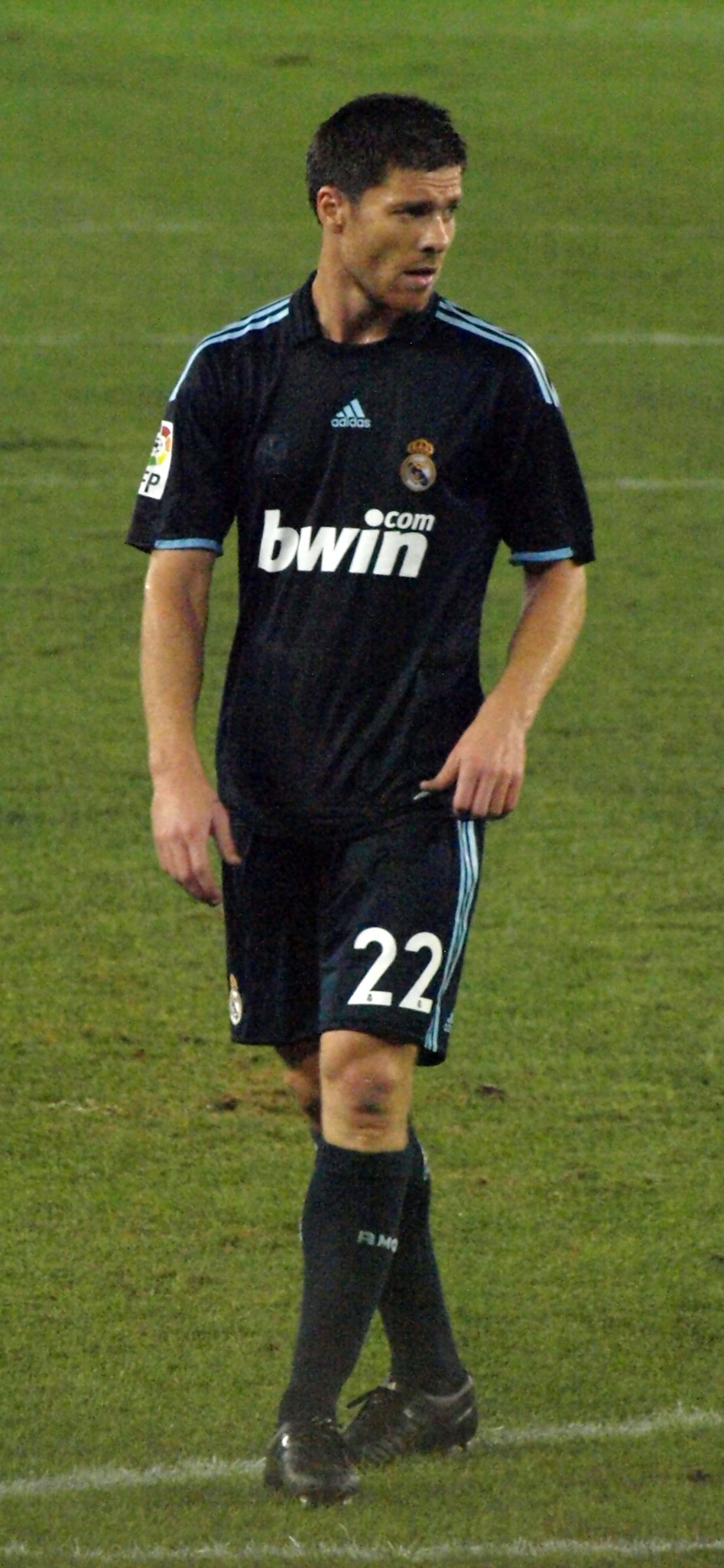 Xabi Alonso en el partido que enfrentó al Real Madrid con el RCD Español en el Estadio de Cornellá-El Prat de la primera vuelta de La Liga 2009/10.